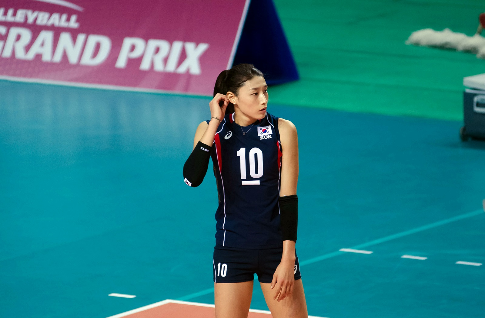 월드그랑프리2